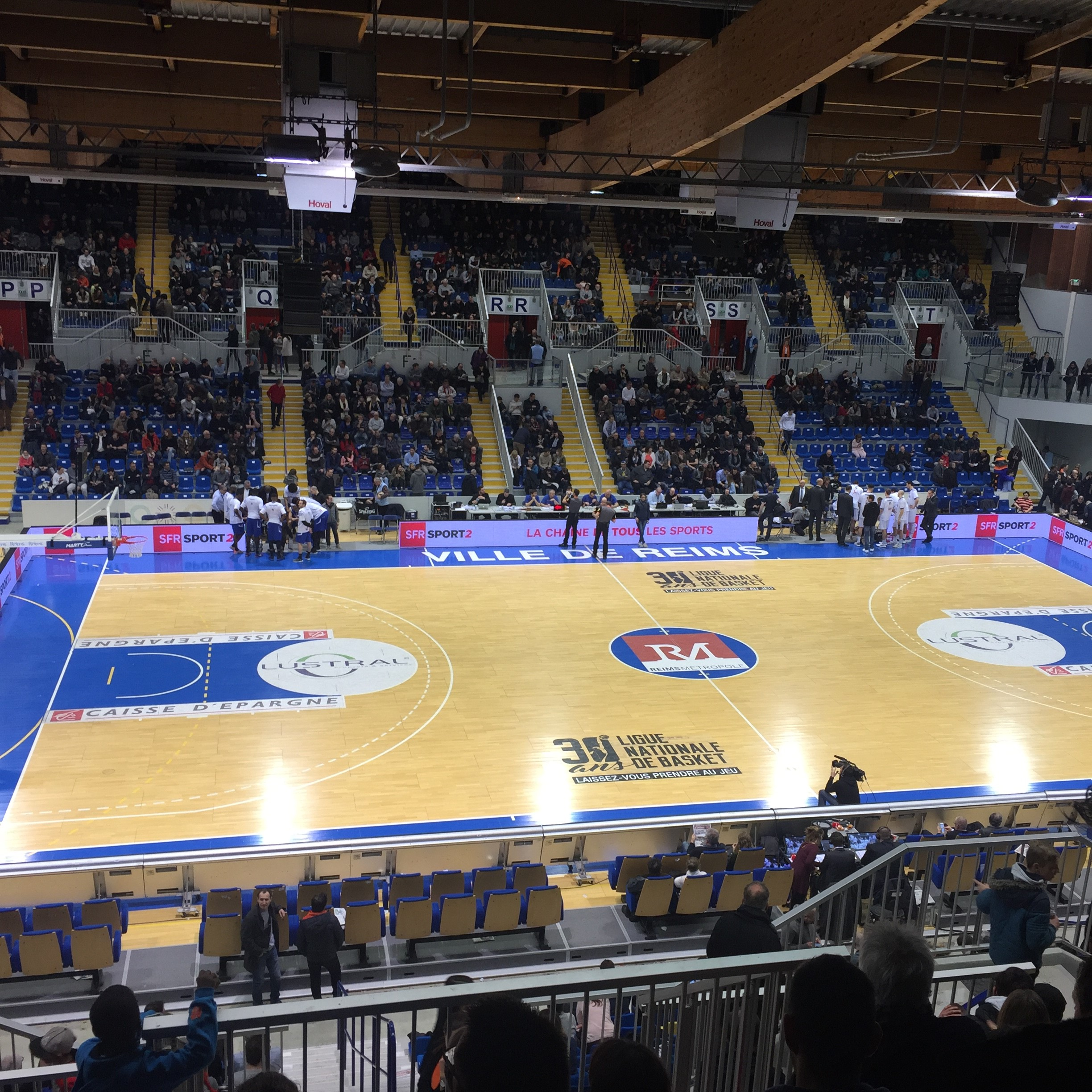 Salle de basket Complexe René Tys Reims